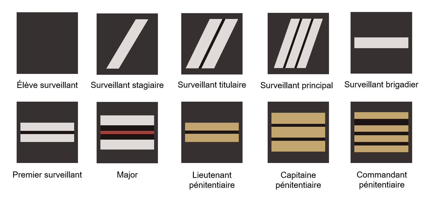 Grades des personnels de surveillance de l'administration pénitentiaire française